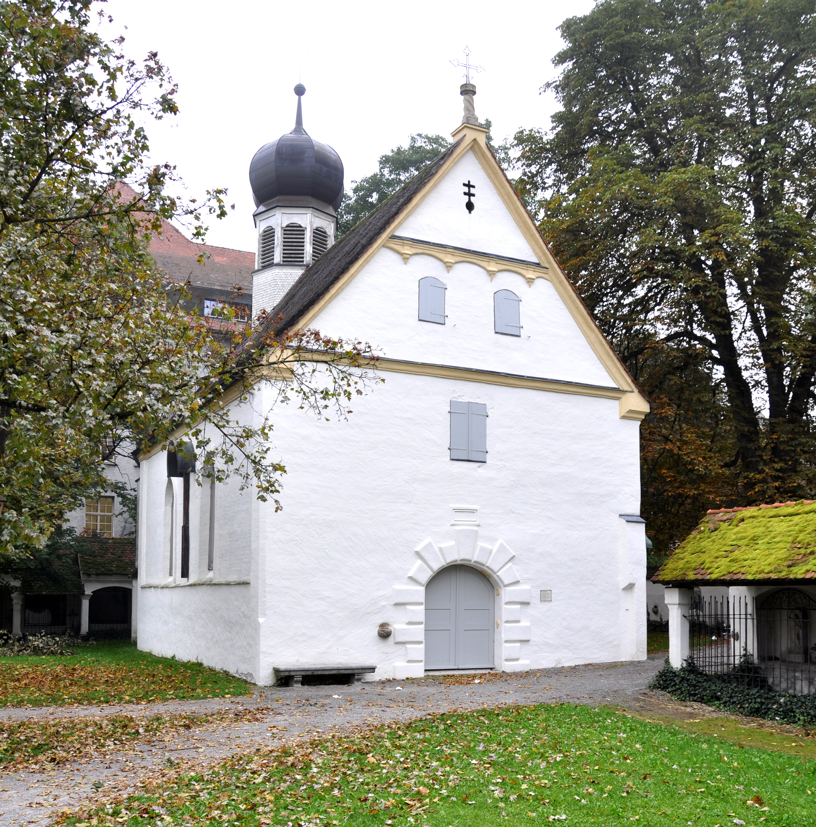 Wangen im Allgäu, Alter Friedhof, Friedhofskapelle St. Rochus